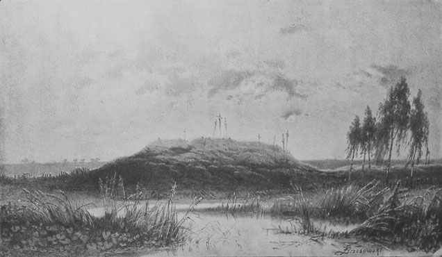 Беларуская (тарашкевіца): Наваградак (Navahradak), Гара Міндоўга (Mindoŭh)